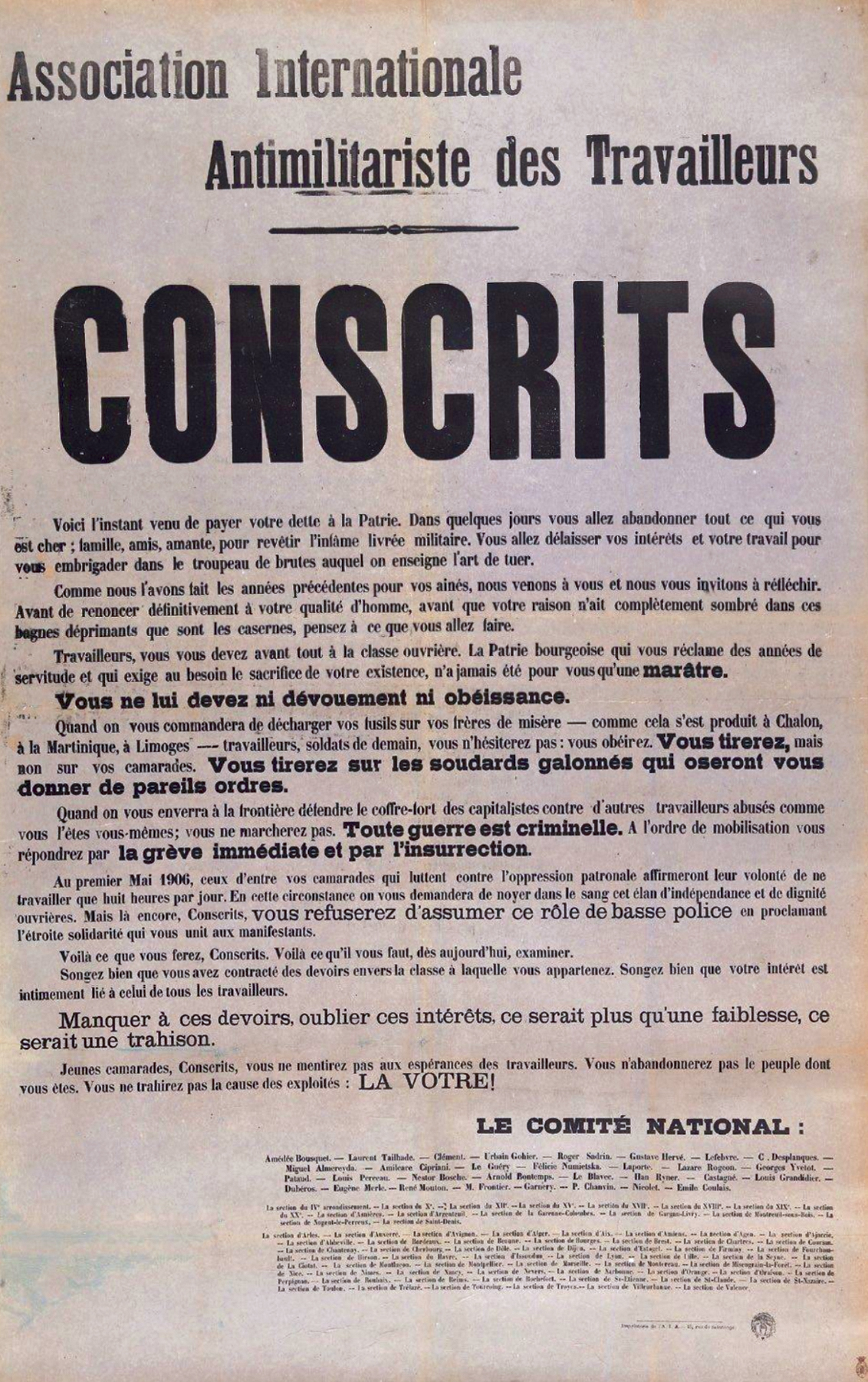 "Affiche imprimée sur papier gris (123,5 x 84 cm), entoilée. Appel aux conscrits à la désobéissance, à la désertion et à l'insurrection. Cet appel, d'une violence inouïe, est signé, pour la branche parisienne, entre autres par Laurent Tailhade, Urbain Gohier, Gustave Hervé, Miguel Almereyda, Louis Perceau, Han Ryner, etc... Ce même texte a été publié simultanément dans diverses villes de France, dans des formats différents et sur des papiers de couleurs différentes, avec les signatures des militants régionaux".